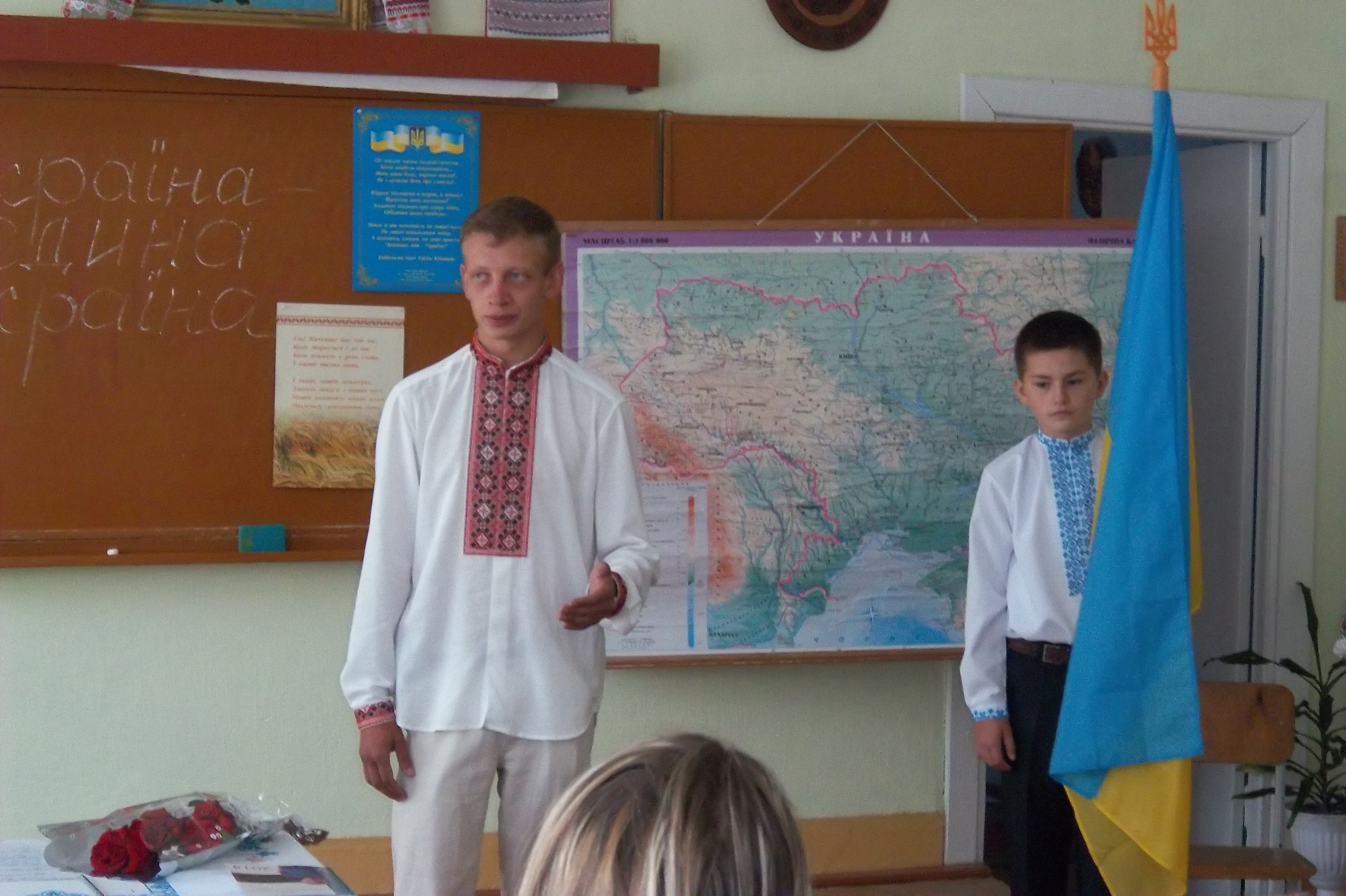 Розповіді Володимира Патоли про значення шкільної освіти у формуванні воїна АТО під час уроку мужності в Колиндянській ЗОШ І-ІІІ ступенів